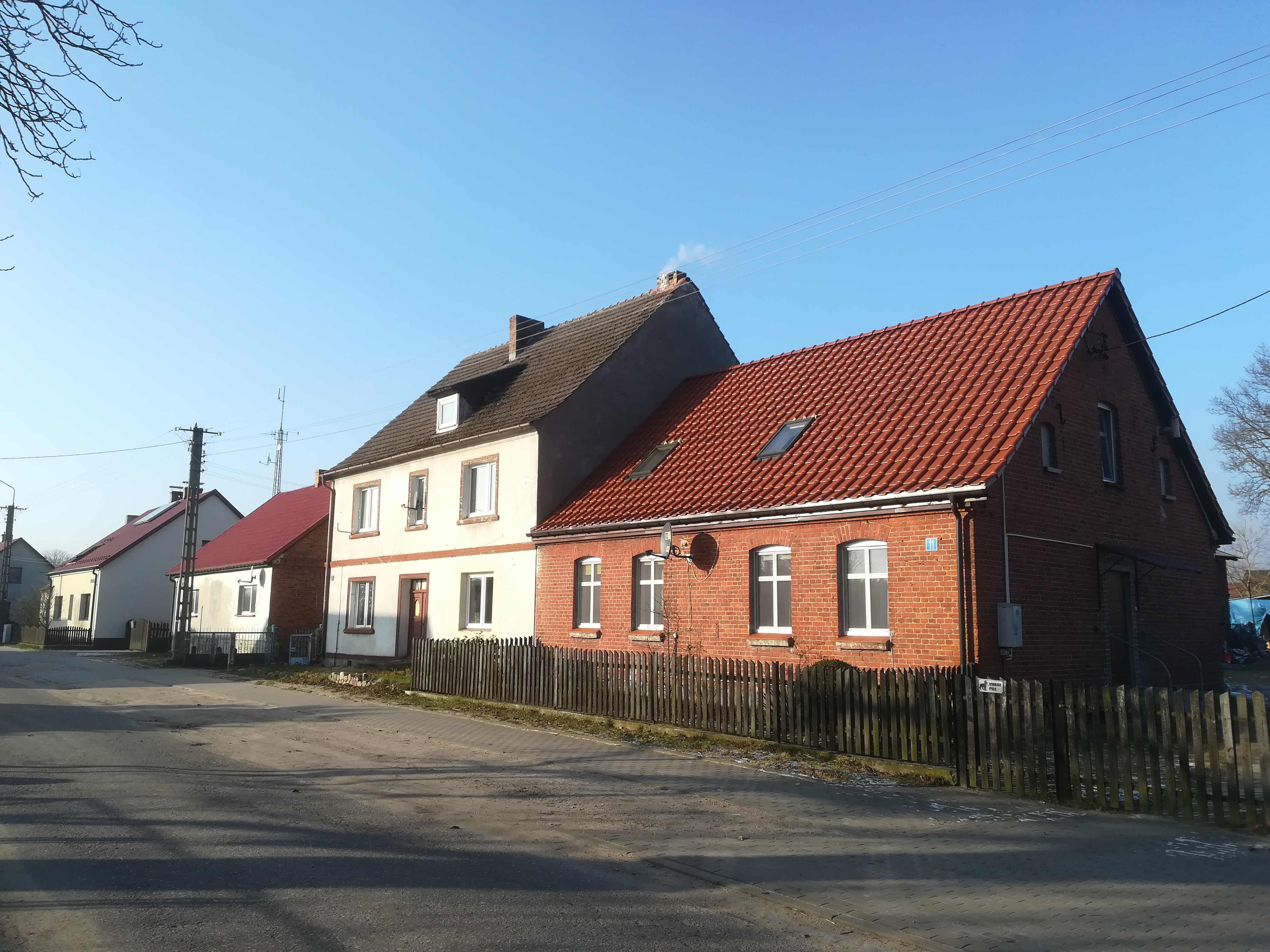 Zabudowa wsi Żółtnica koło Szczecinka.